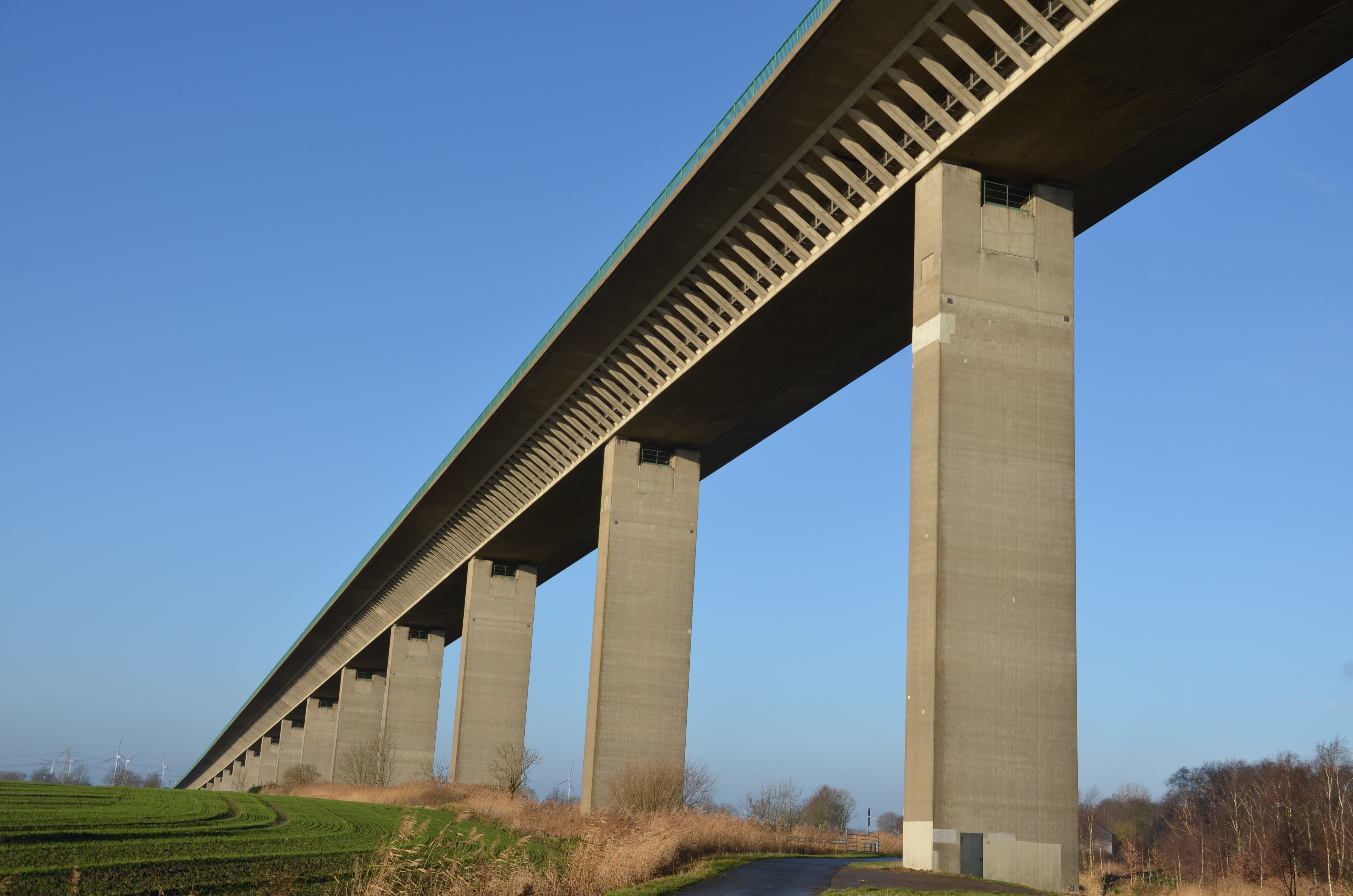 Seitliche Ansicht der Hochbrücke in der Schleusenstadt Brunsbüttel.